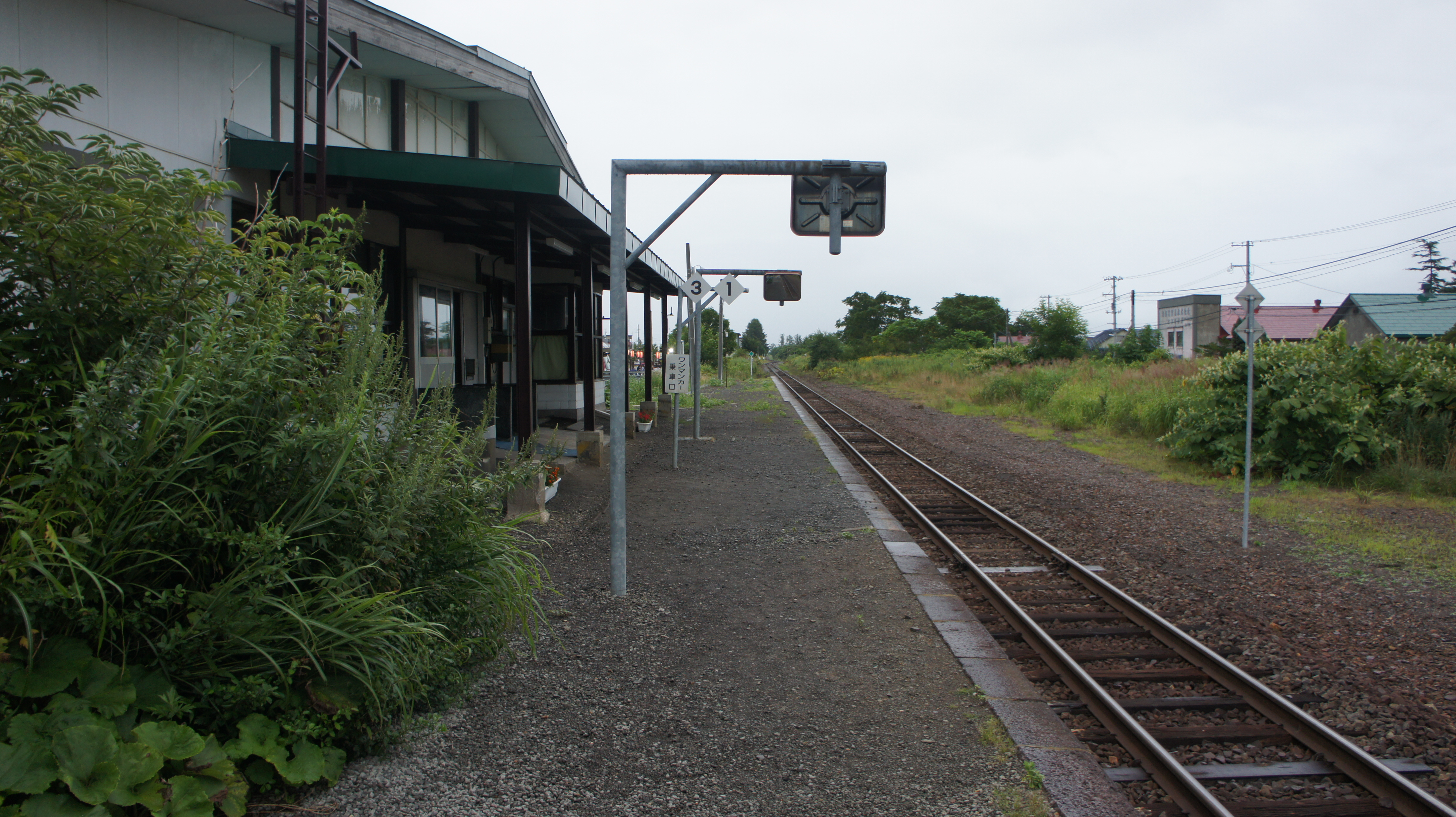 JR函館本線・仁木駅のホーム